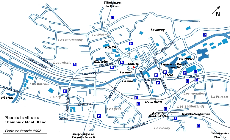 Plan, de l'année 2008, du centre ville de la commune de Chamonix-Mont-Blanc en France dans le département de la Haute-Savoie. J'ai réalisé moi même ce plan à l'aide d'un logiciel de DAO.